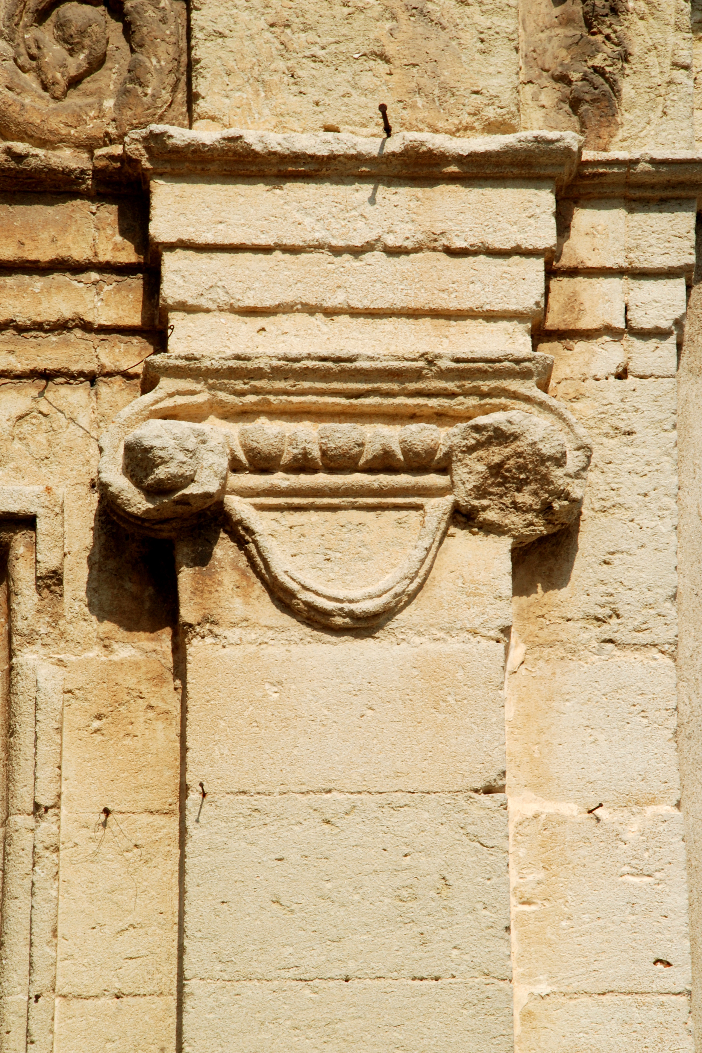 France - Gard - Église de Saint-Césaire-lès-Nîmes